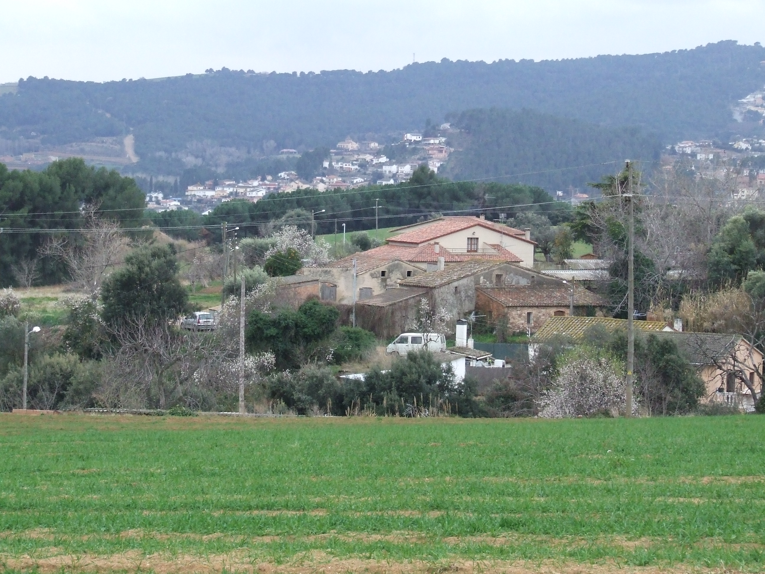 Can Lleuger del Pla (Bigues, Bigues i Riells, Vallès Oriental)